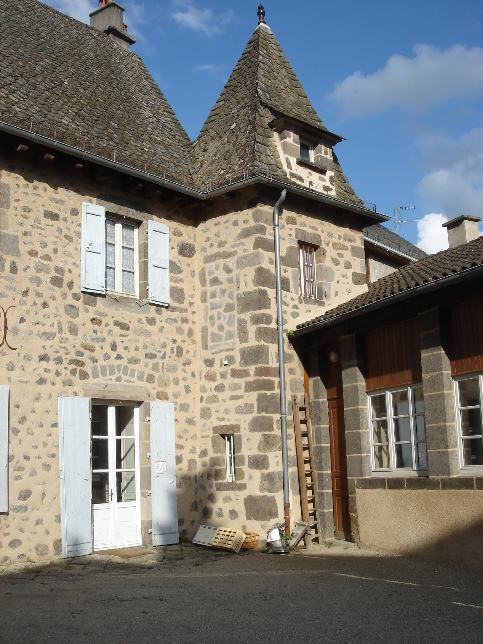 Ancienne école Saint-Antoine, actuellement prespytère de Vic.